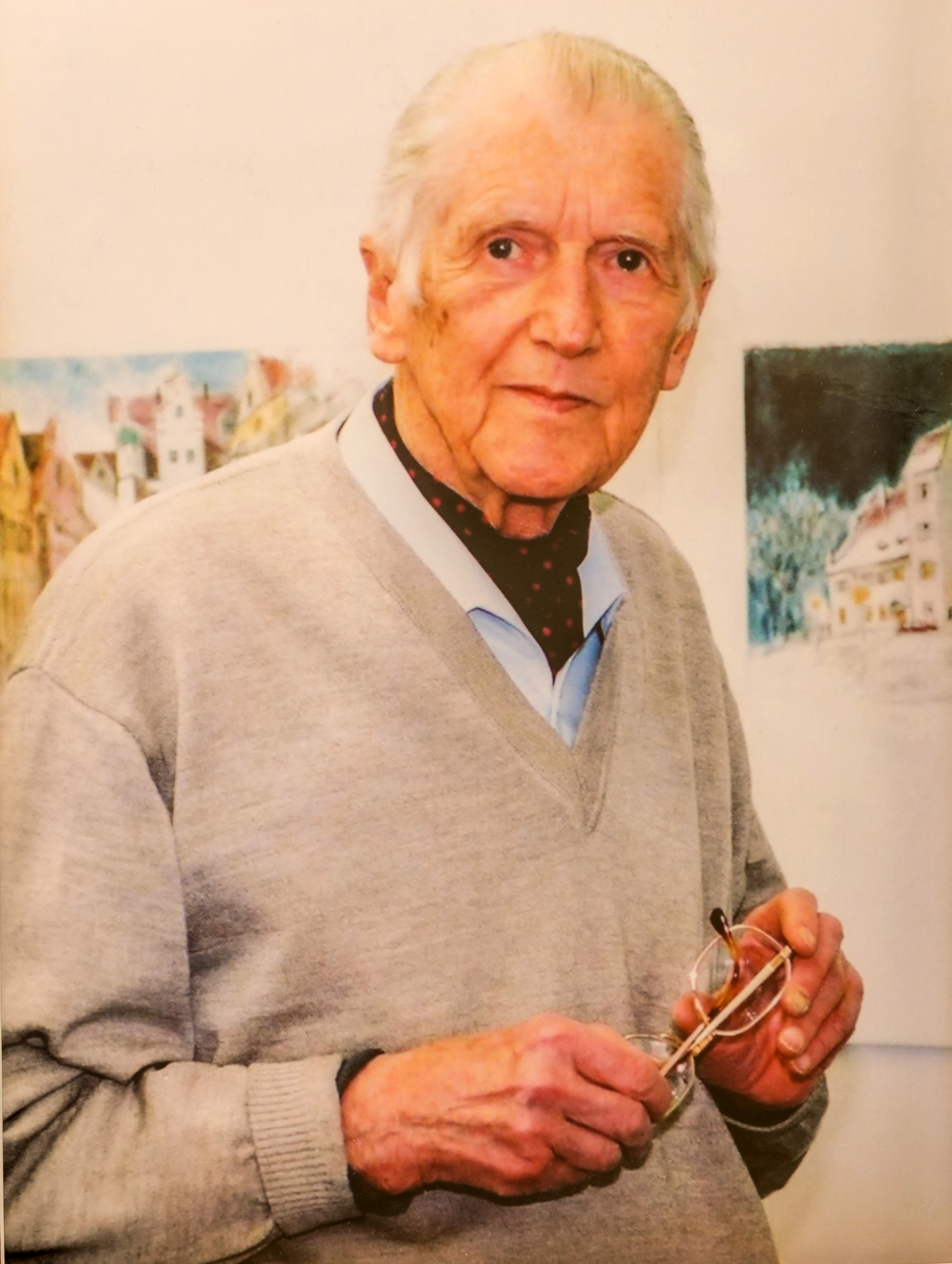 Portrait Heinz Schubert (1912-2001)